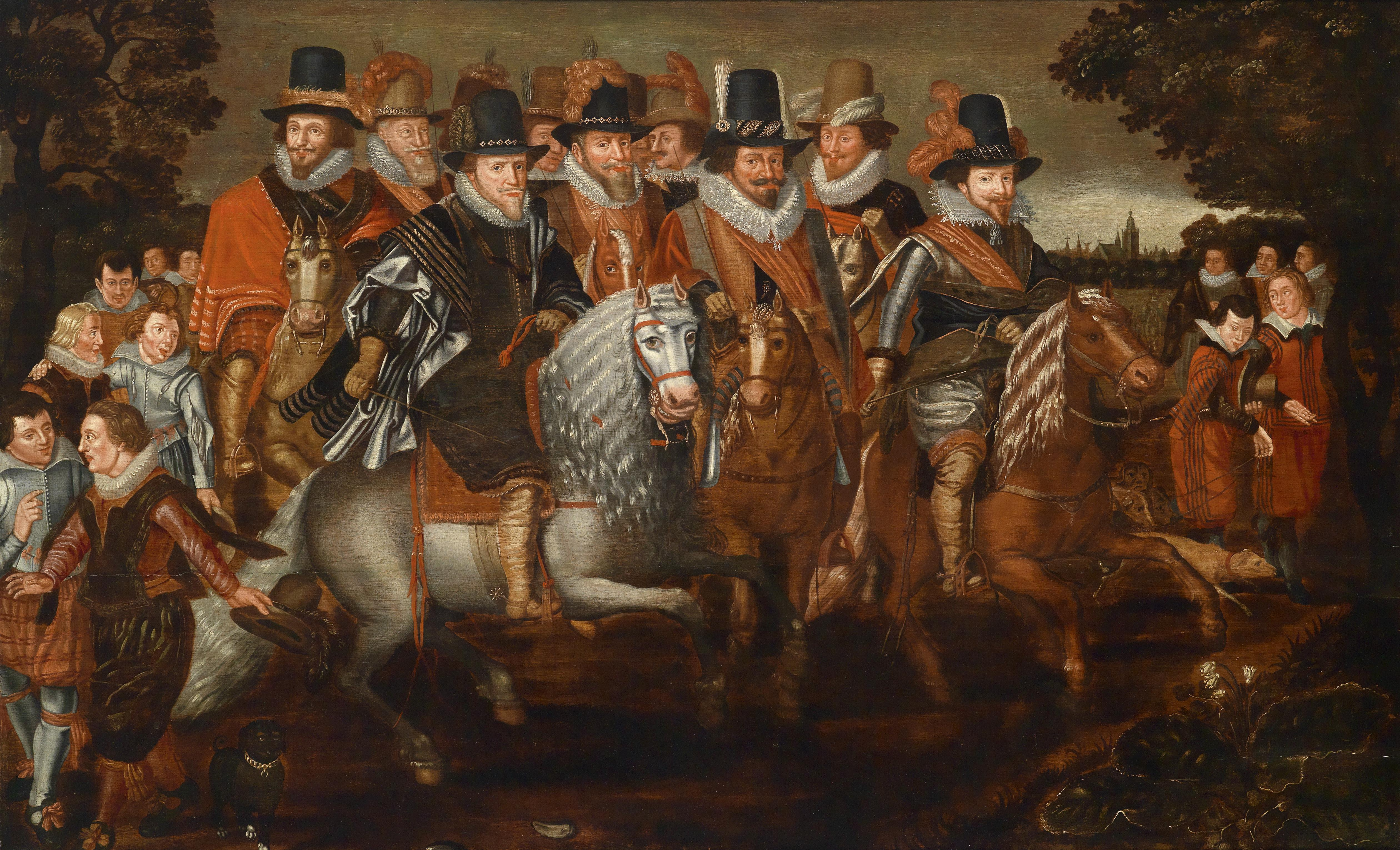 Die Kavalkade der Prinzen von Nassau, 1. Reihe: Moritz (1567-1625), Philipp Wilhelm (1558-1618), Friedrich Heinrich (1584-1647), 2. Reihe: Wilhelm Ludwig (1560- 1632), Ernst Kasimir (1573–1632) und Johann Ernst, Öl auf Holz, 78 x 127 cm, nach einem Stich von W. J. Delff (1621) nach einem Gemälde A. P. van de Venne